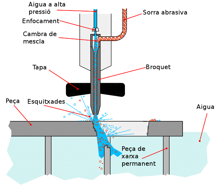 Esquema corte de chapa por chorro de agua